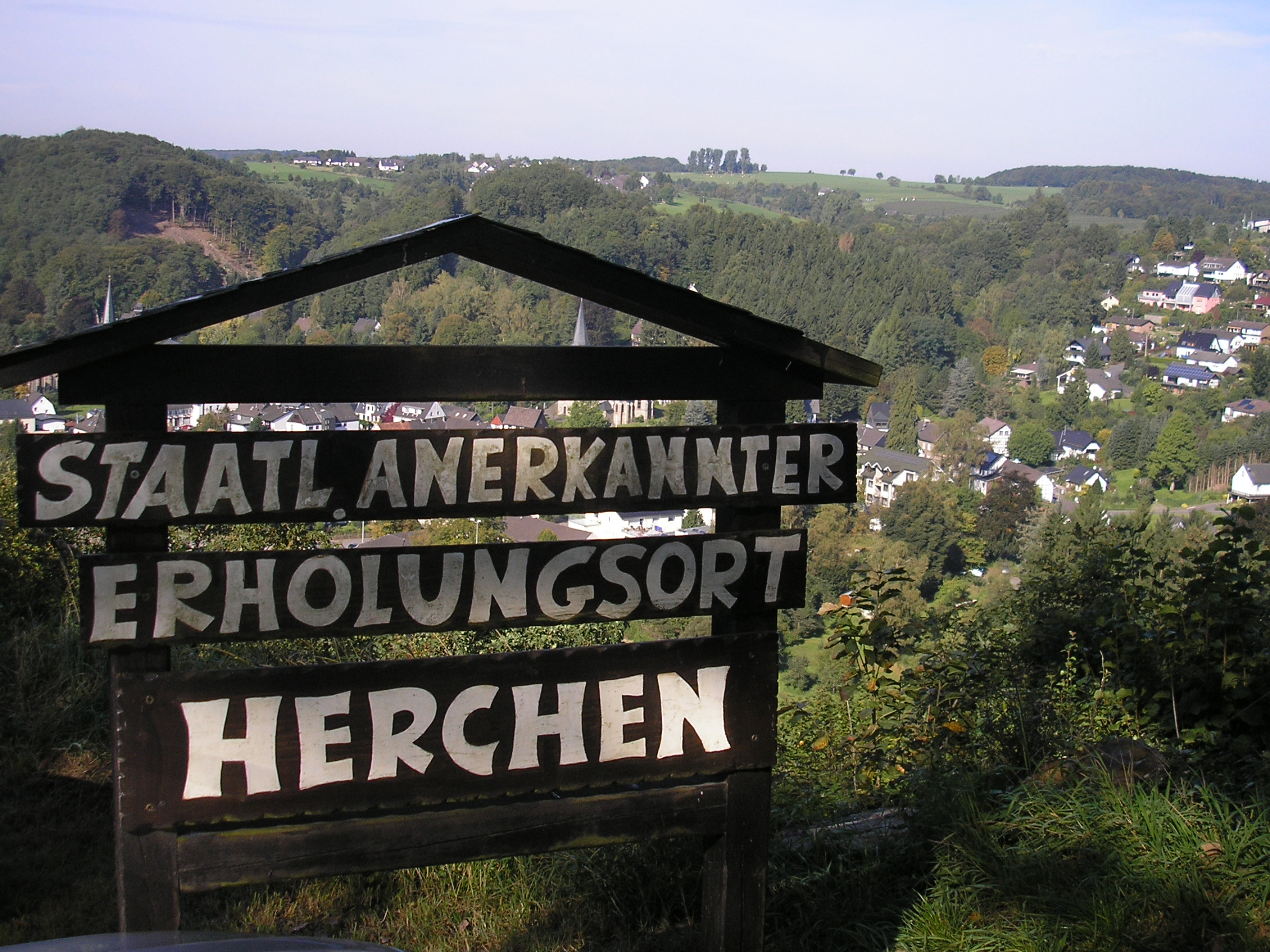 Erholungsort Windeck-Herchen